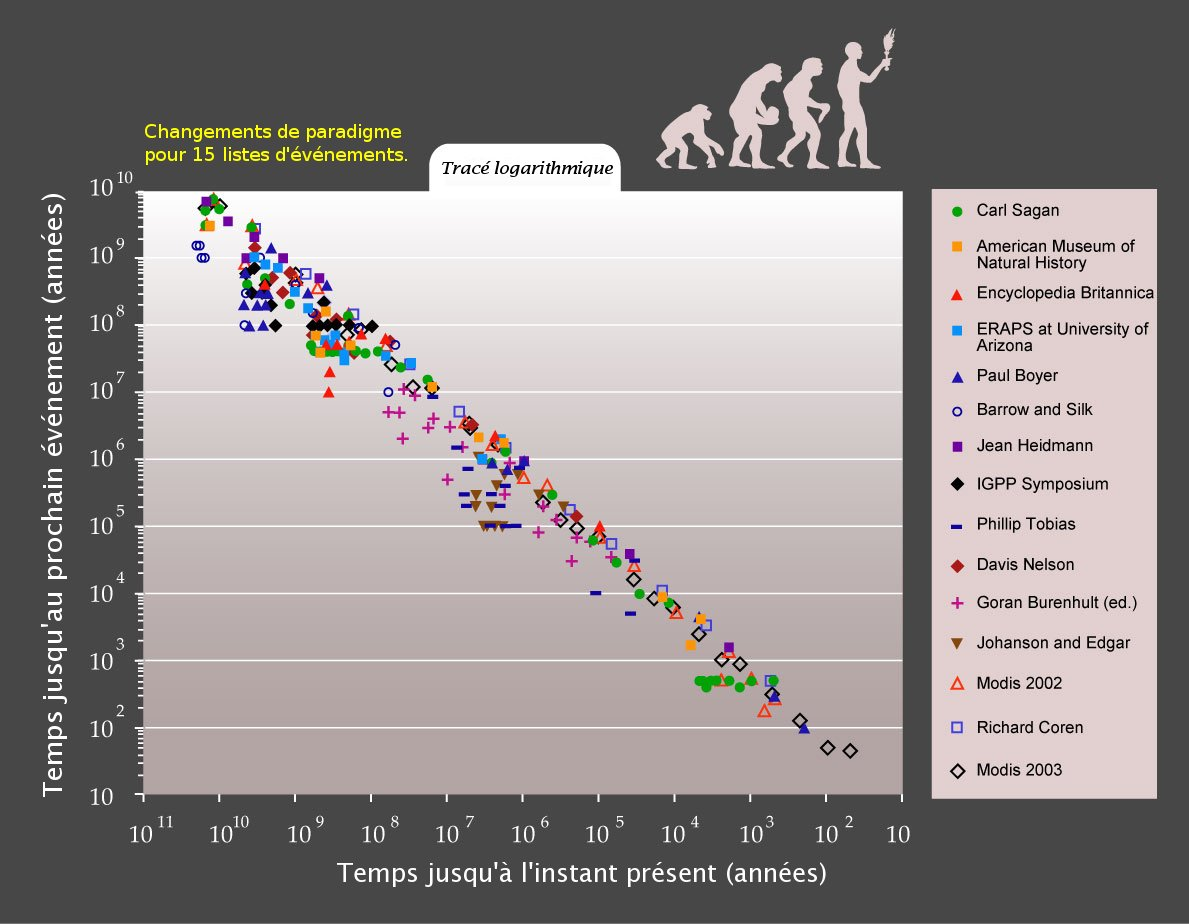 Avec l'aimable autorisation de Ray Kurzweil et de Kurzweil Technologies, Inc.